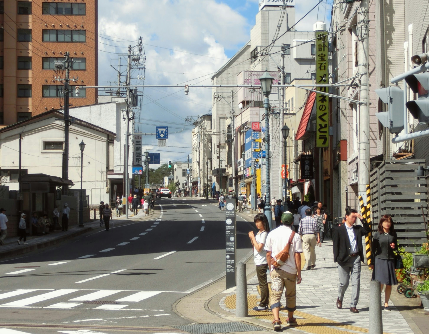 青森県弘前市一番町の様子。2014年撮影。